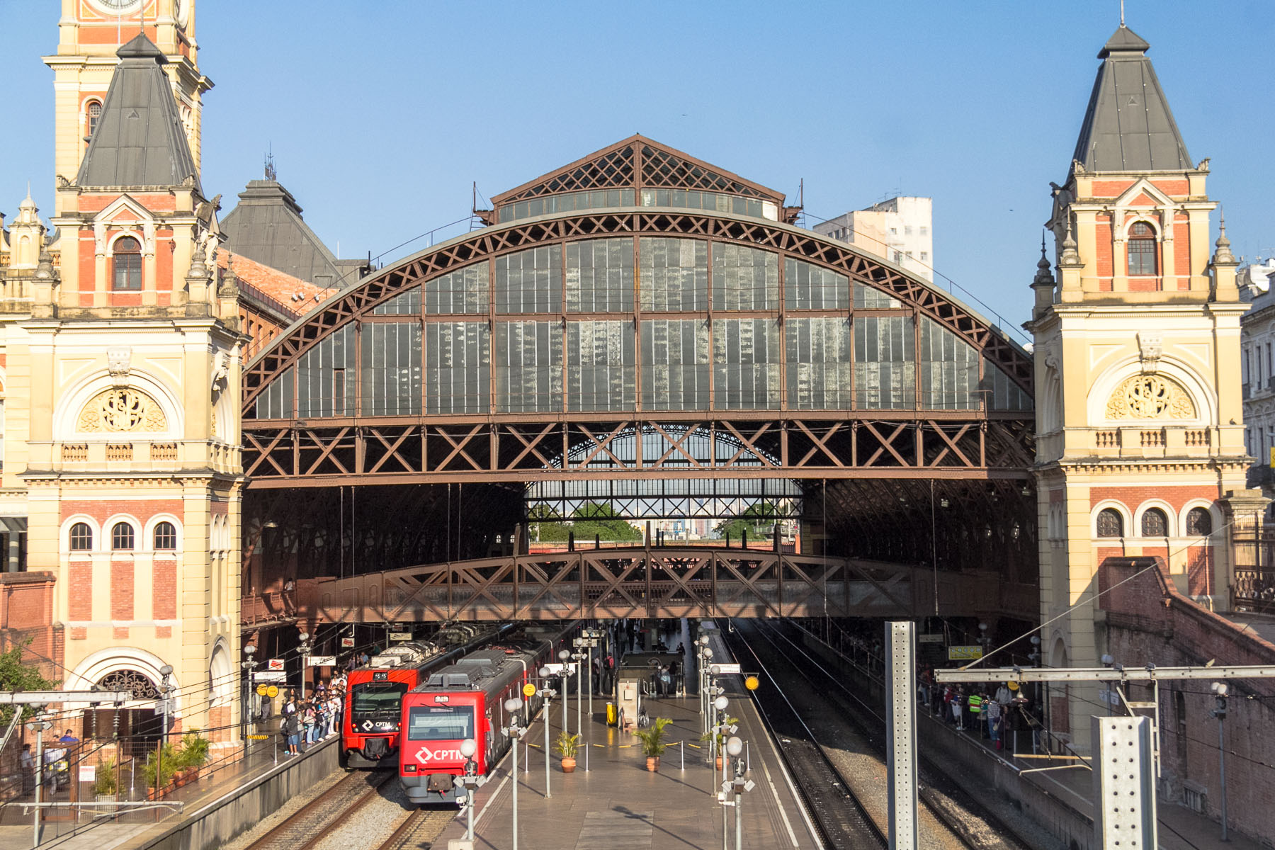 Estaçao da luz,Sao Paulo,Brasil,foto tomada em Outubro 2013